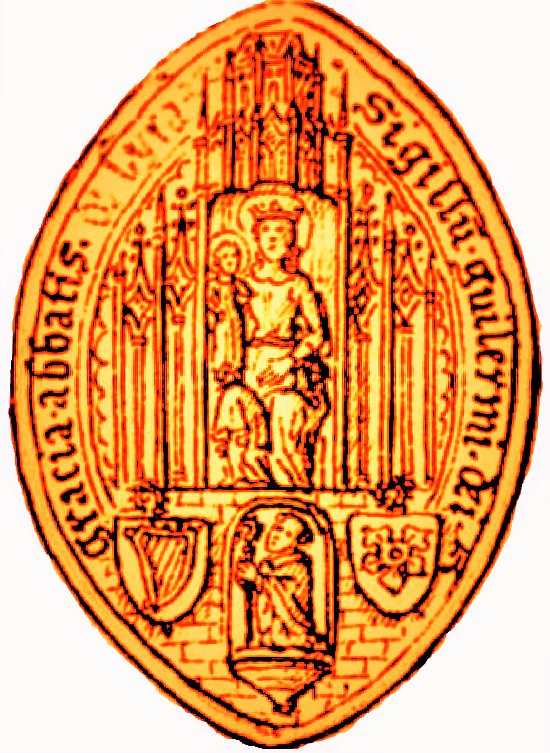 La Vieille-Lyre, Eure, Abbaye de Lyre, Sceau de l'abbé 1458 (image du domaine public modifiée)